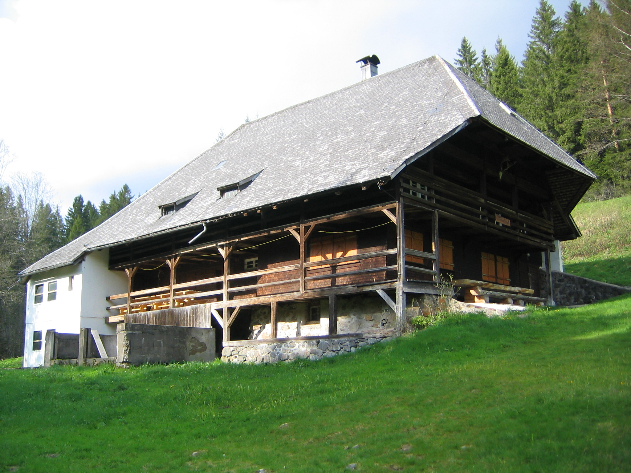 Der Wunderlehof in Feldberg-Bärental, in dem der Thriller "Black Forest" gedreht wurde